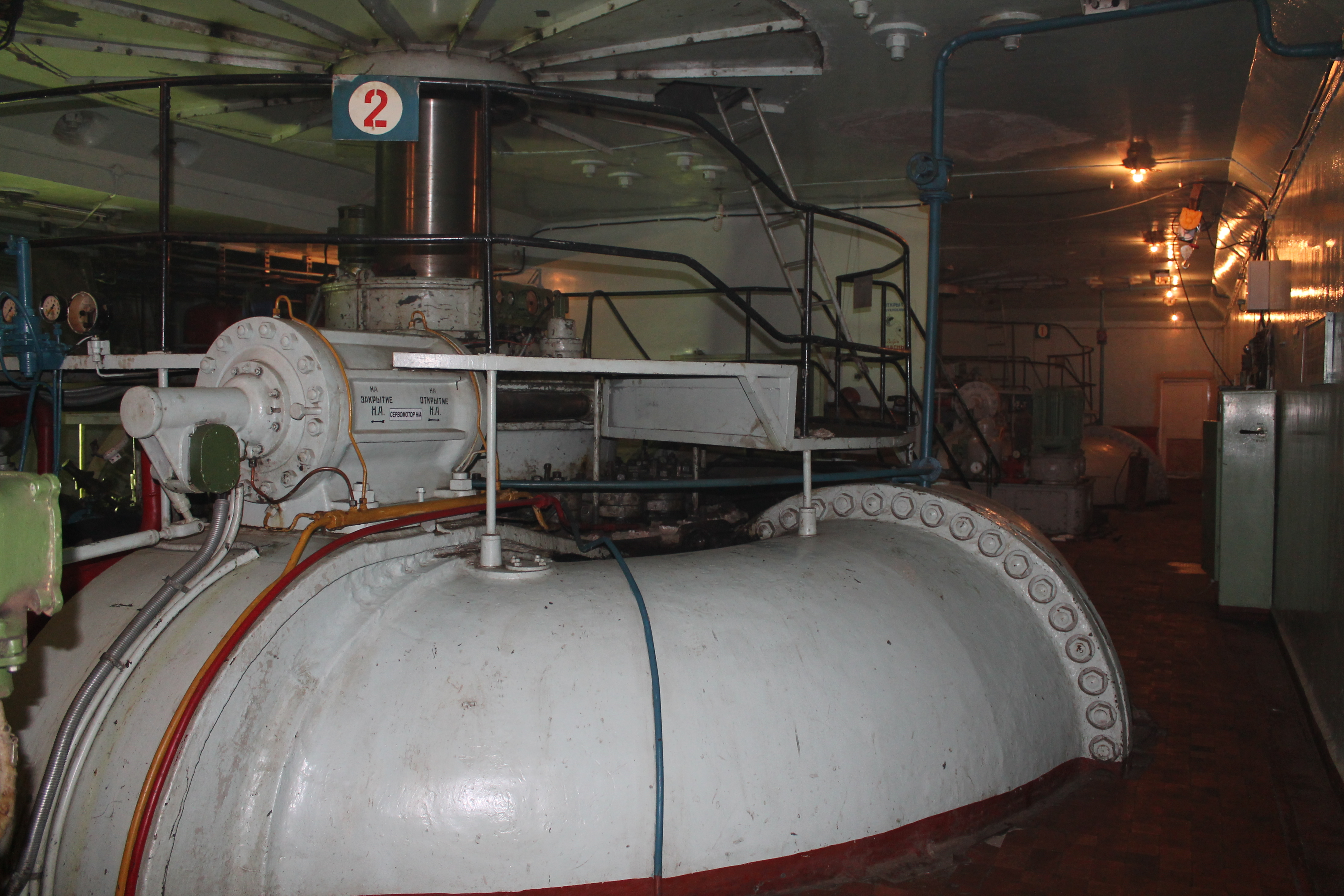 Турбины Разданской ГЭС